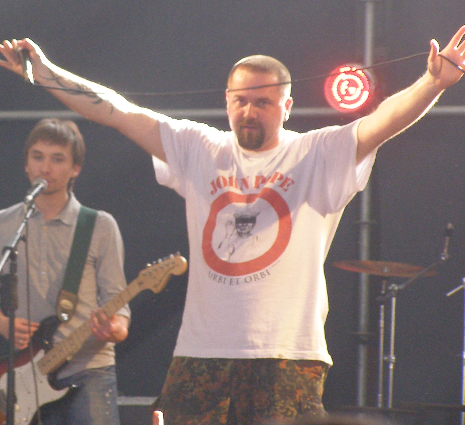 Kumar - Sänger der ukrainischen Rockband »Toster«. Während »Ruynatsiya« Festival in Lwiw